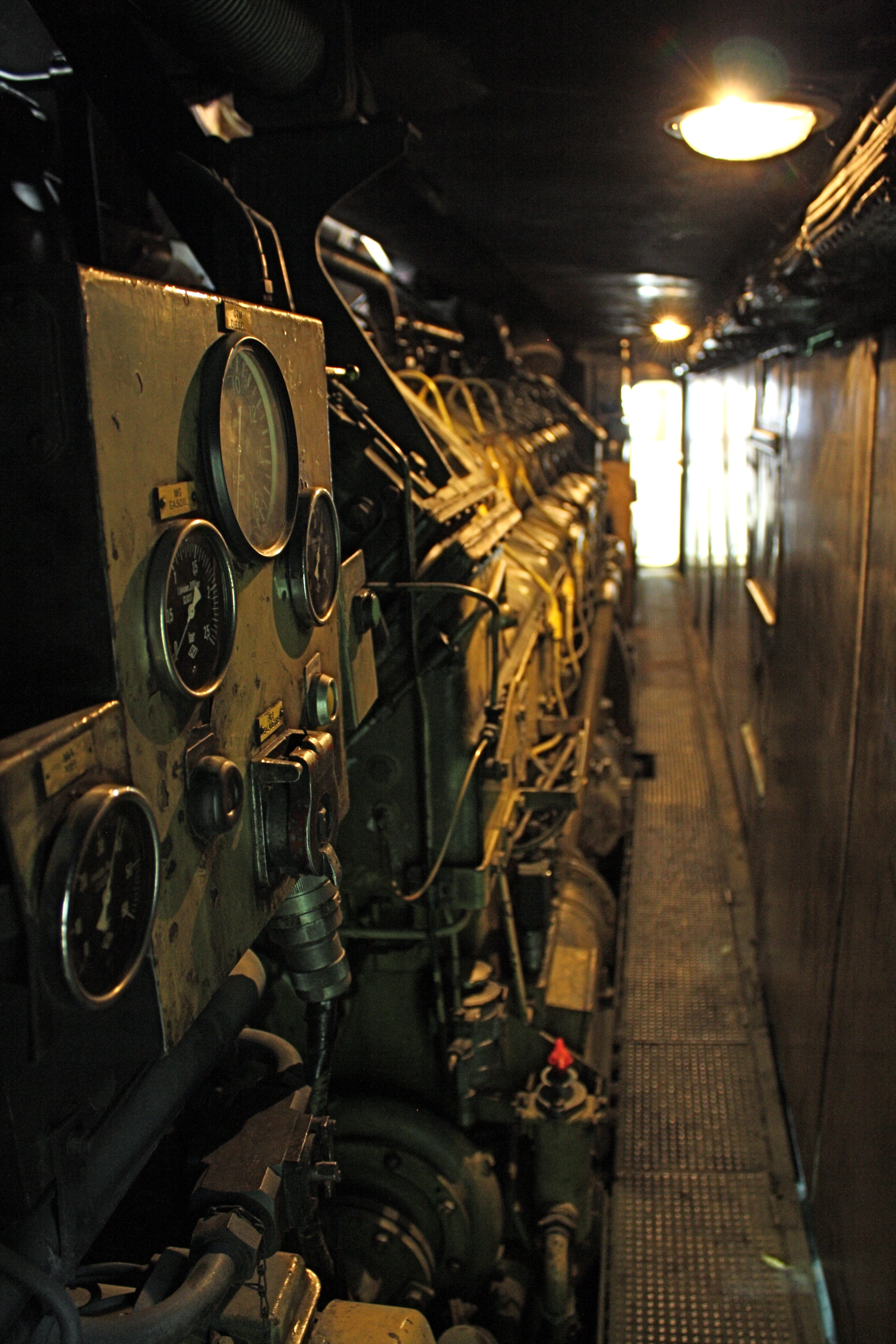 Aperçu moteur diesel équipant la CC 72064. La série AGO, du nom de ses concepteurs Grosshans & Ollier, produite par la SACM (Société Alsacienne de Constructions Mécaniques) en 12 et 16 cylindres en V, est une évolution des blocs MGO utilisés aussi bien dans les marines marchande et militaire que l'industrie (groupes électrogènes de centrales...), en France comme à l'étranger. cylindrée: 146 240 cc - 146,24 l puissance: 2 650 kW @ 1 350 tr/min. masse: 17,7 t cap. carburant: 5 500 l consommation: 3,3 l/km Ainsi motorisée la 72000 était apte à 140, puis 160 km/h. Au cours des années 80, certains exemplaires reçurent des propulseurs Pielstick plus puissants.